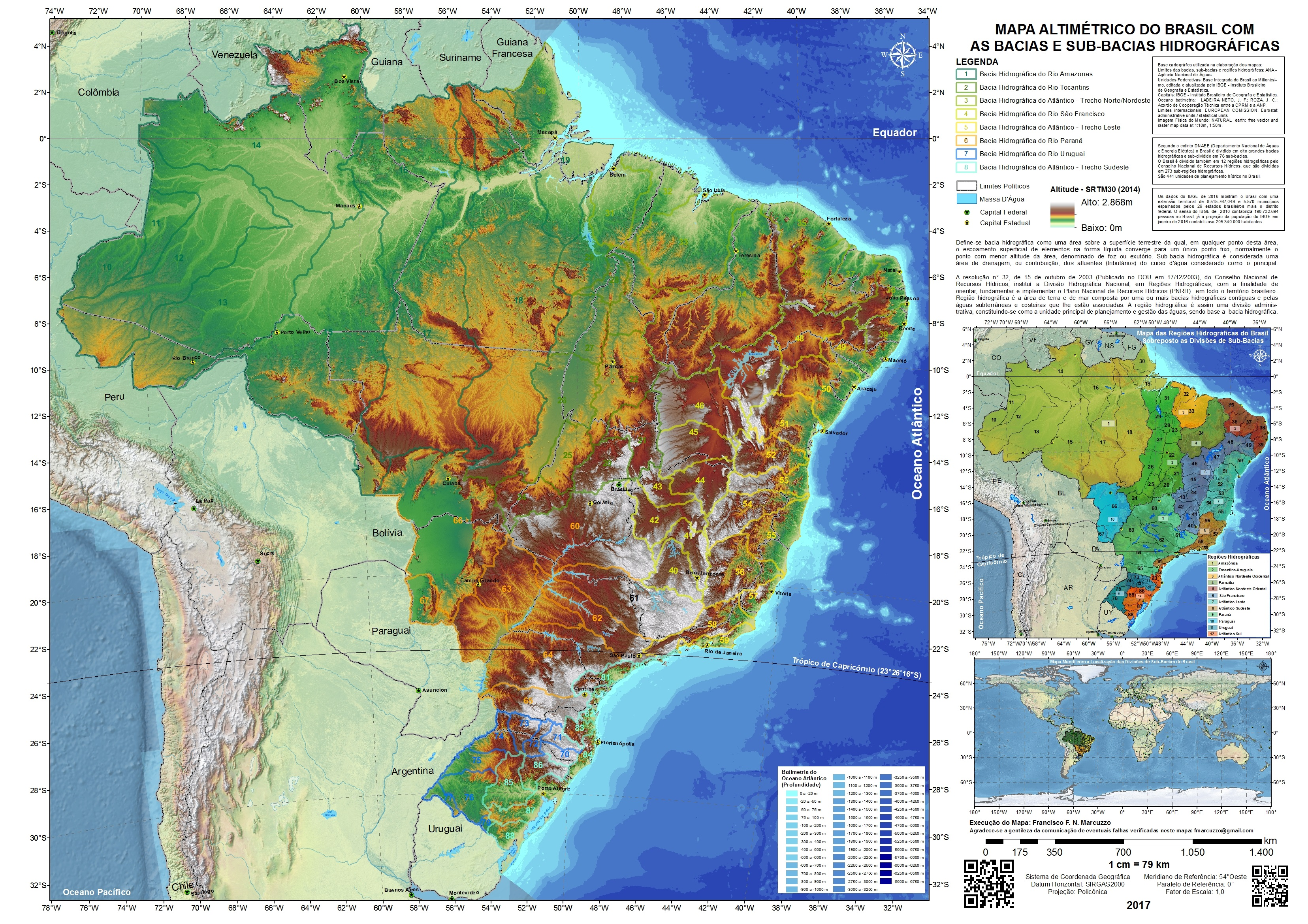 Sub-Bacias Brasil Mapa Altimetria Policonico 100dpi